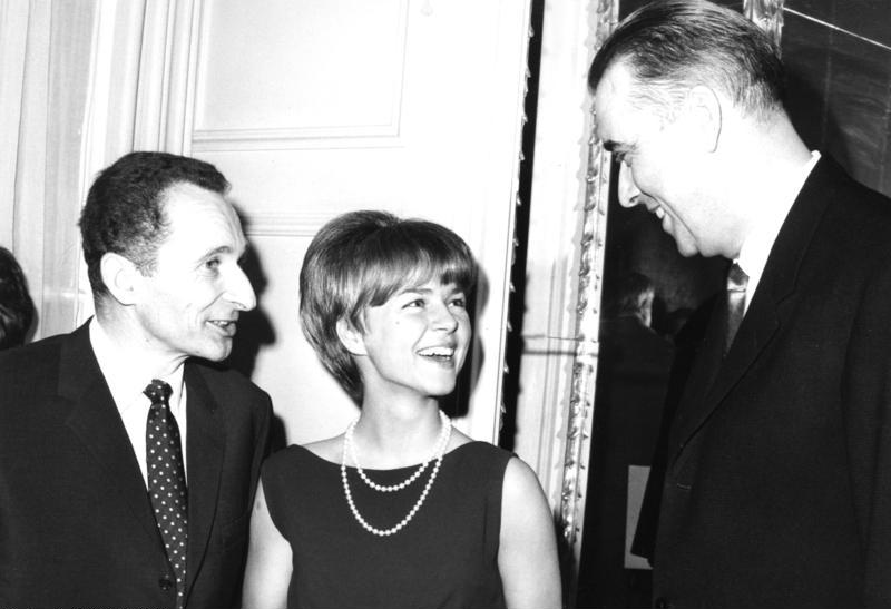 18.3.1966 Berlin/West v.l.n.r.: Prof. Dr. Walter Höllerer, Kunstpreis für Literatur, Cornelia Froboess, Fernsehpreis "Junge Generation" Prof. Walter Rossow, Kunstpreis für Baukunst und Gartengestaltung